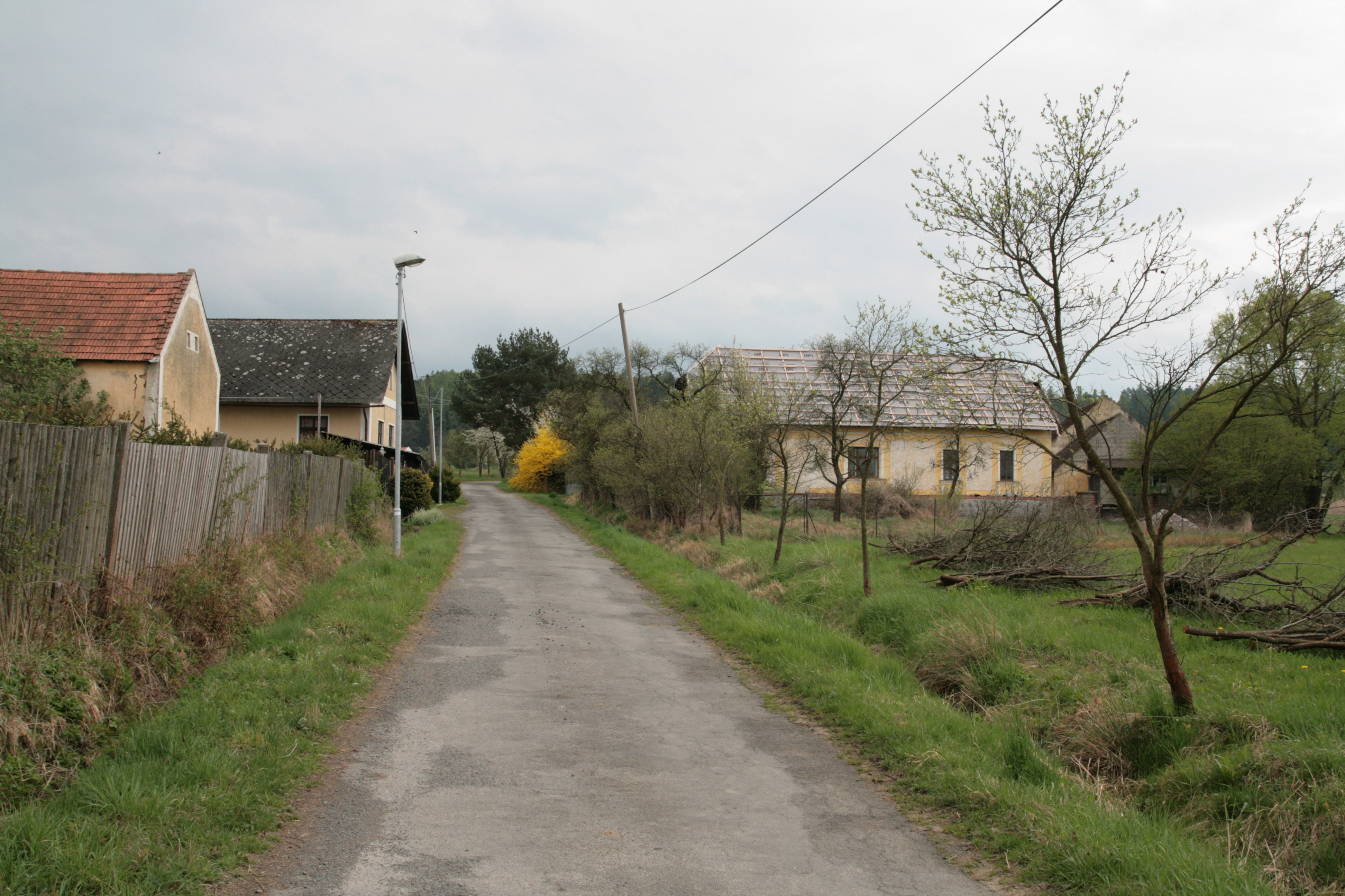 Vesnice Kamýk, část města Švihov. Domy čp. 19 (vlevo) a 15 (vpravo) u Těšnic.